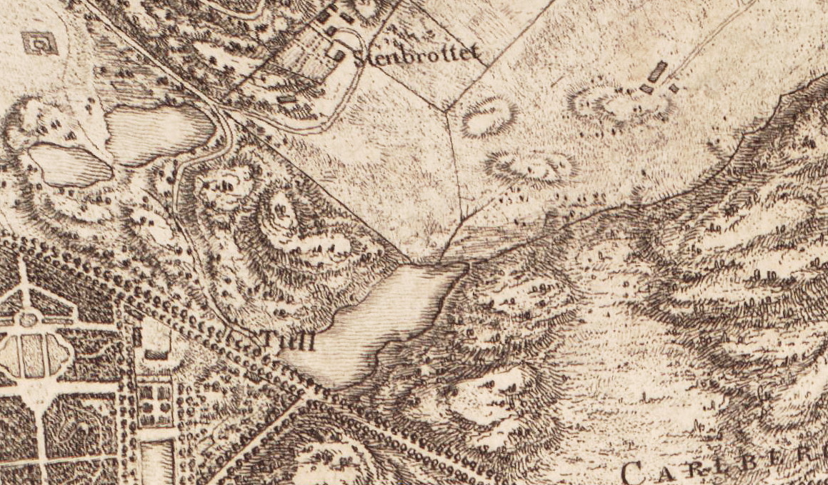 Bomsjön, Stenbrottet och Ryssberget